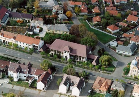 Jászapáti, Hungary, aerialphotography